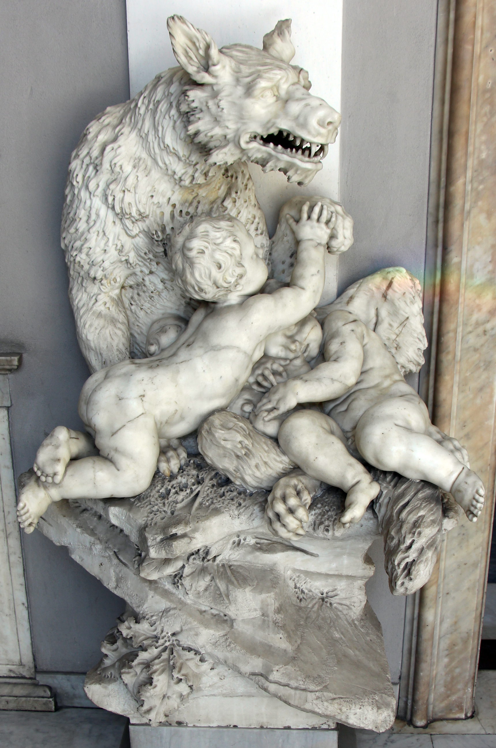 Domenico Parodi e Francesco Biggi, Romolo e Remo allattati dalla lupa (Palazzo Rosso, Genova) The making of this document was supported by Wikimedia CH. (Submit your project!) For all the files concerned, please see the category Supported by Wikimedia CH. This is a photo of a monument which is part of cultural heritage of Italy.